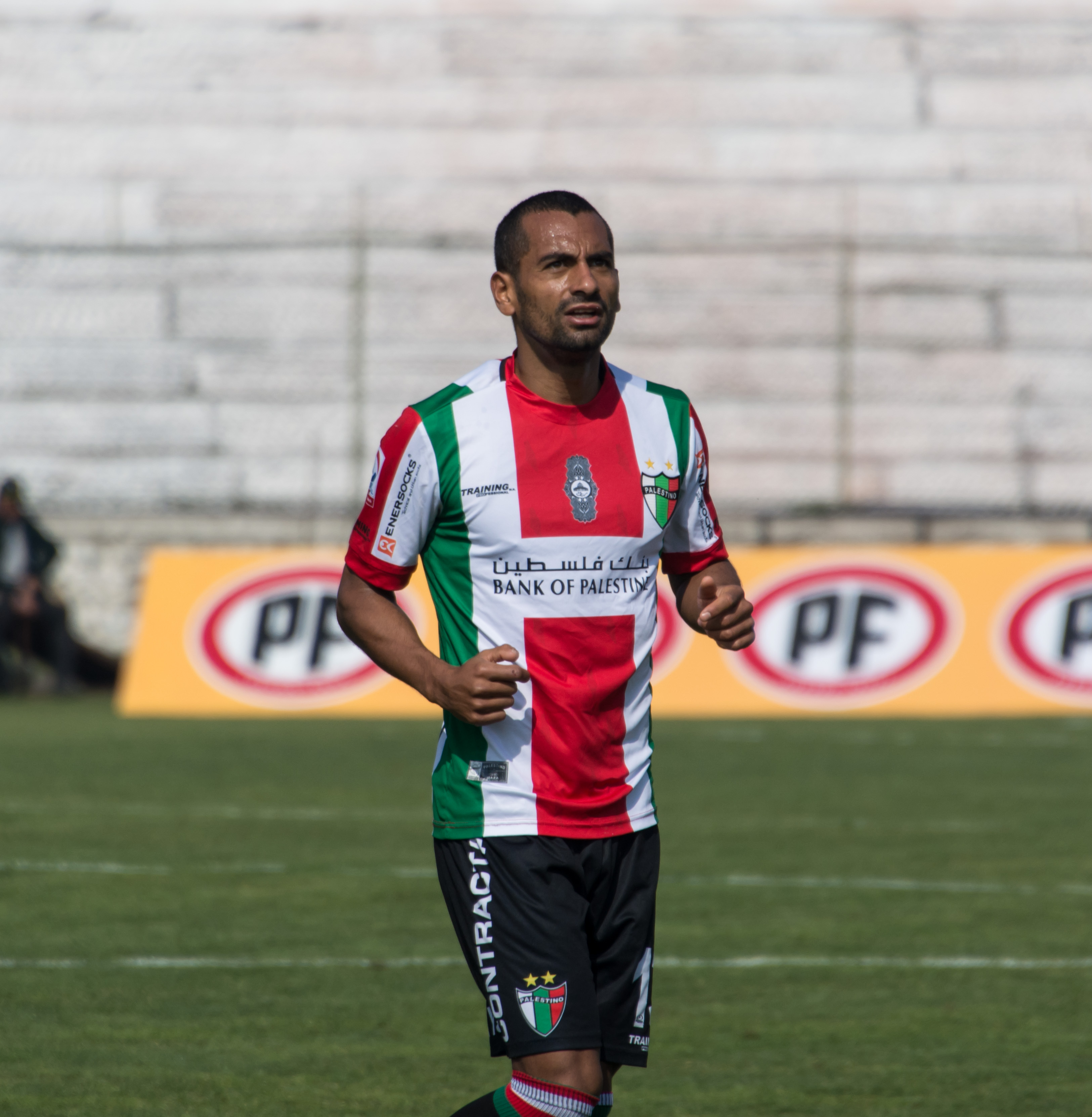 César Cortés, Palestino v Deportes Temuco, Estadio Municipal de La Cisterna, La Cisterna, Santiago, Chile